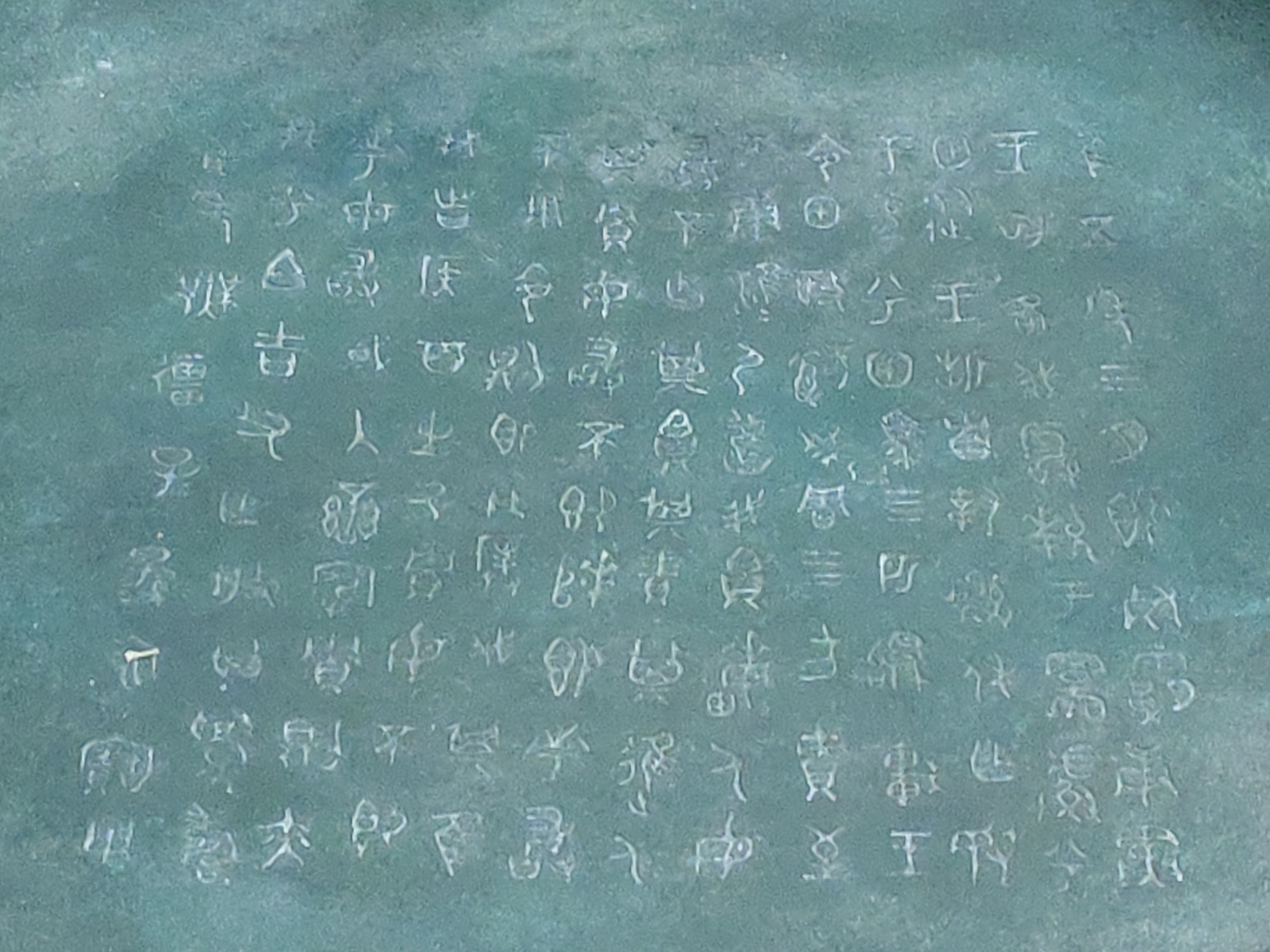 中文（中国大陆）: 潍坊博物馆藏文物